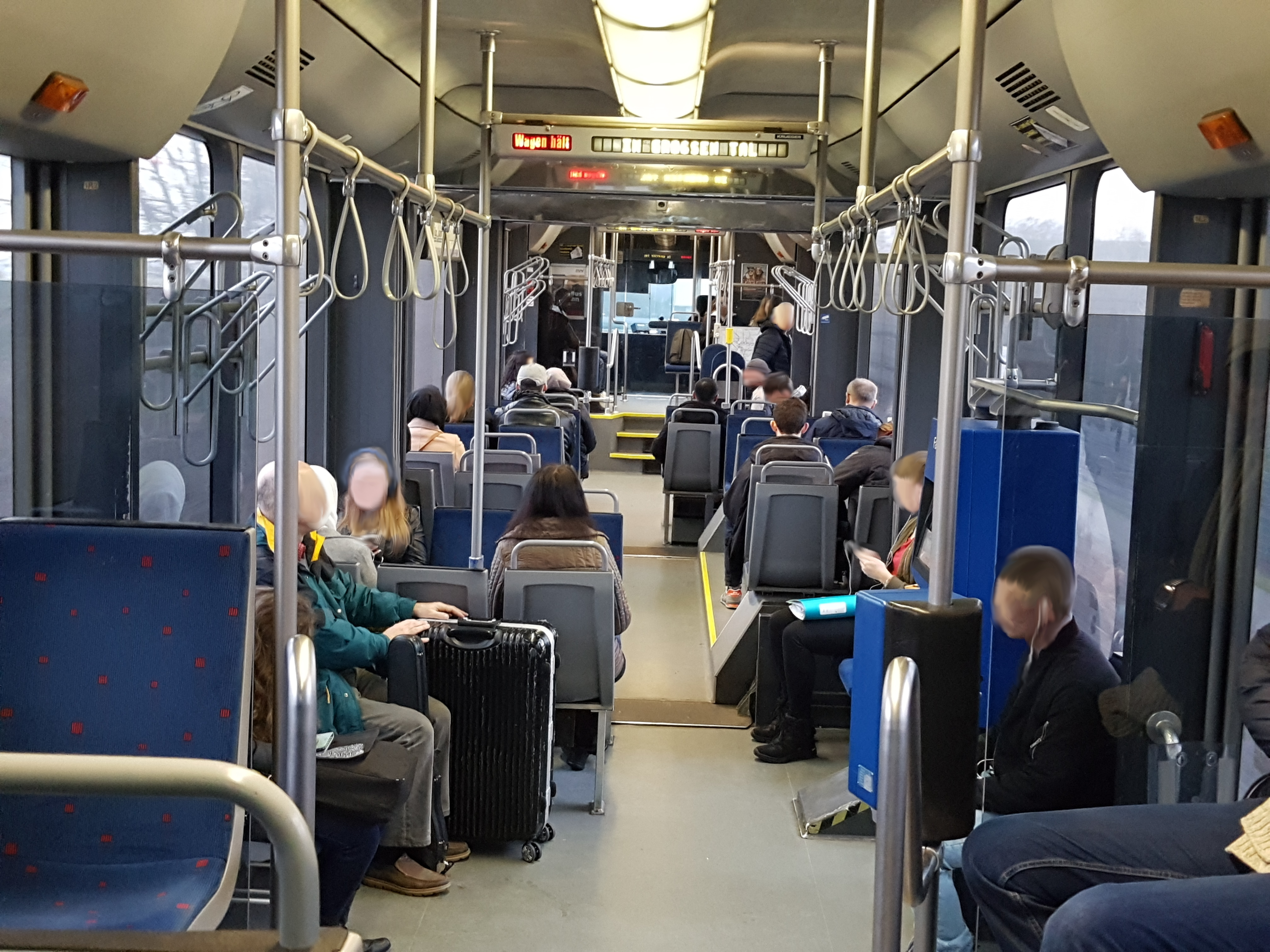 Die RegioSprinter verfügen über einen sehr hohen Innenraum mit ebenfalls auffallend hohen Fenstern. Die Dürener Kreisbahn baute direkt zu Beginn des Einsatzes mit Blick auf die touristisch interessante Rurtalbahn Düren - Heimbach (Eifel) einige Hängevorrichtungen für Fahrräder ein. Klimaanlage und WC gab es jedoch nicht. Das Foto zeigt das Innere von Fahrzeug 6.007.1 (Blick nach hinten), es fährt gemeinsam mit Fahrzeug 6.010.1, welches sich im Rücken des Fotografen befindet, auf der Strecke Jülich - Düren.